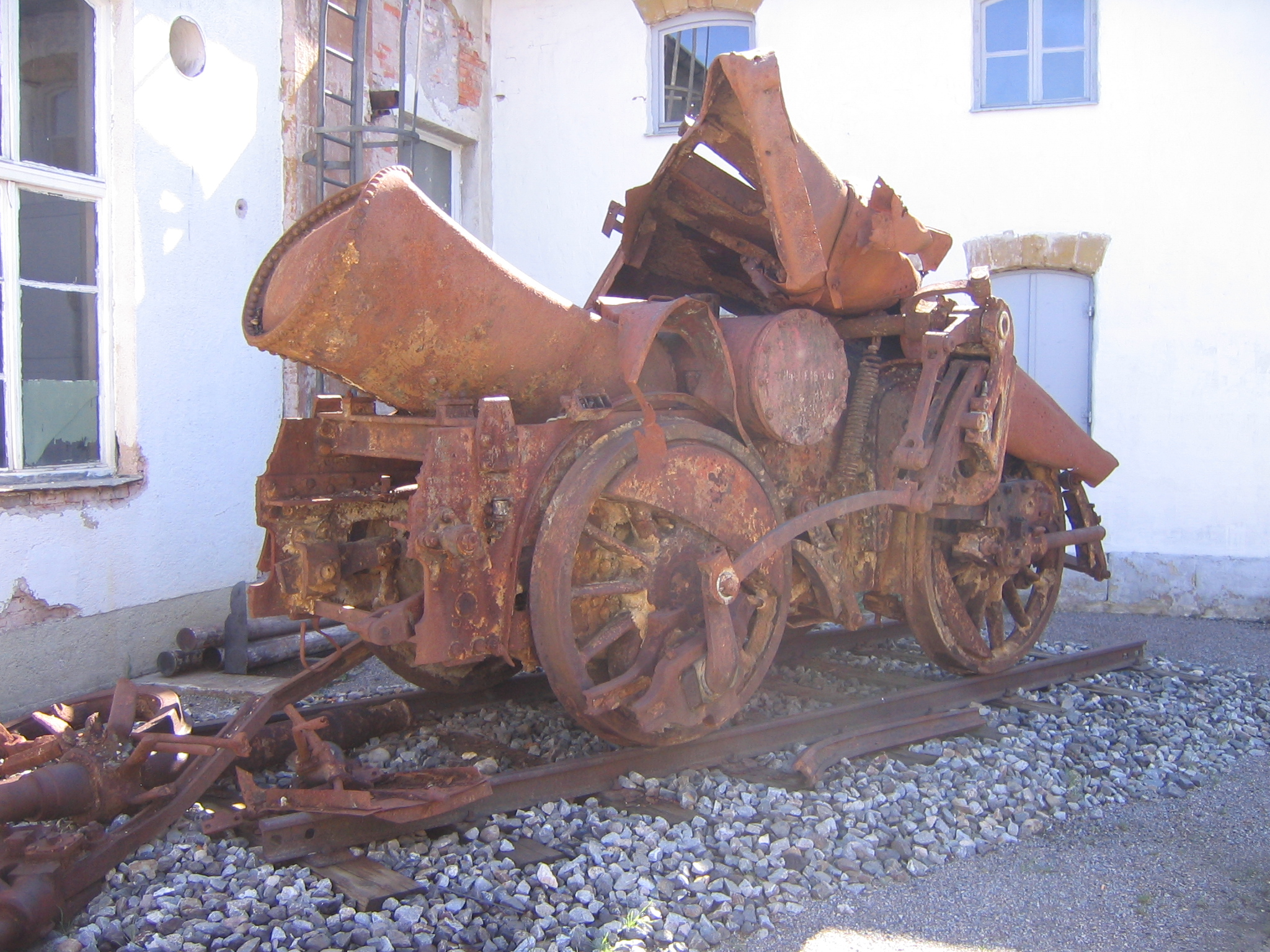 Wrackteile der Bayerischen G 3/4 H, die bei dem Bombenangriff vom 11. April 1945 in Treuchtlingen zerstört wurde. Sie befinden sich heute im Bayerischen Eisenbahnmuseum in Nördlingen.